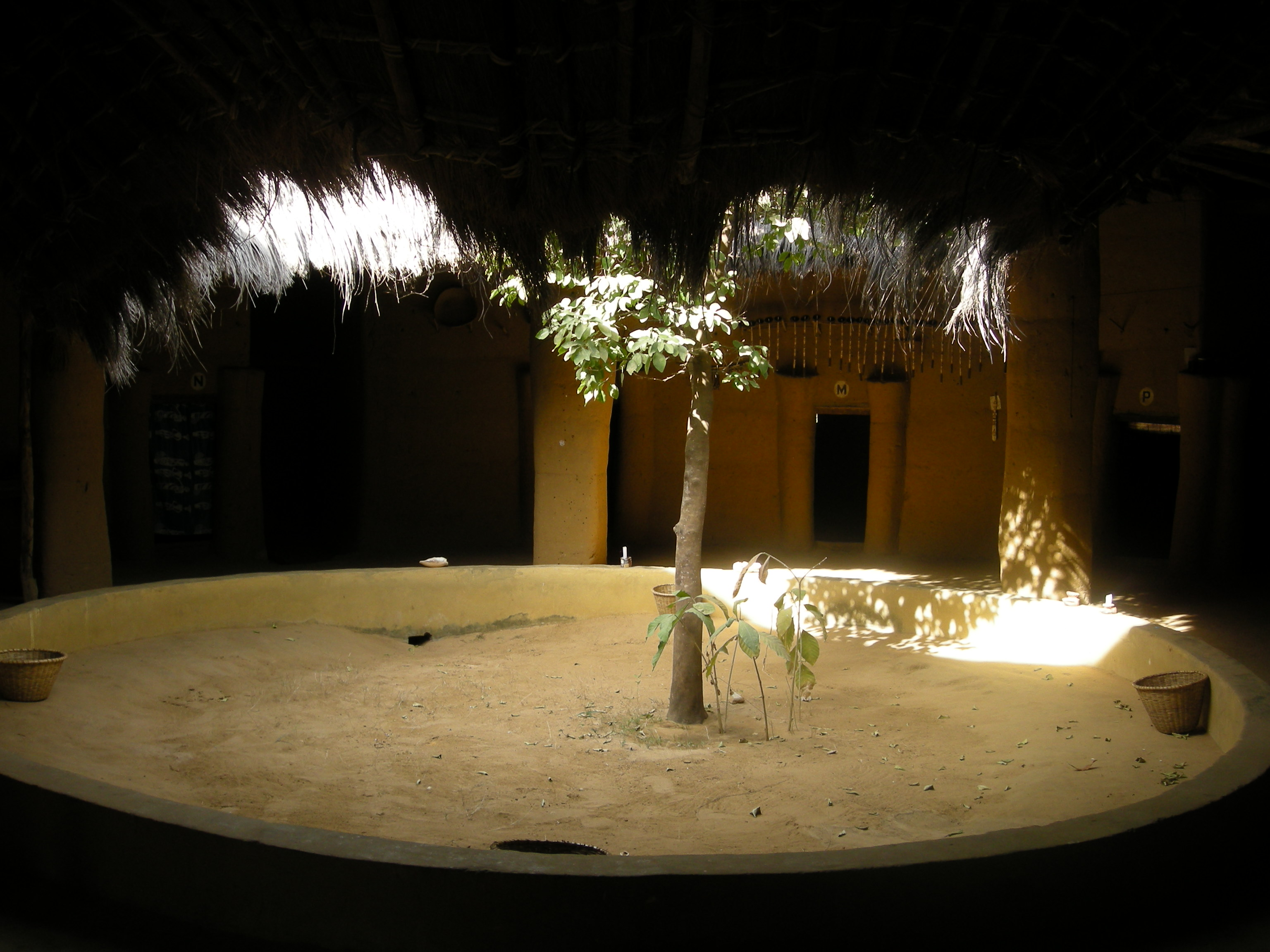 Case à impluvium (sur le modèle traditionnel) dans le campement villageois d'Enampor (Casamance, Sénégal). Accès aux chambres.